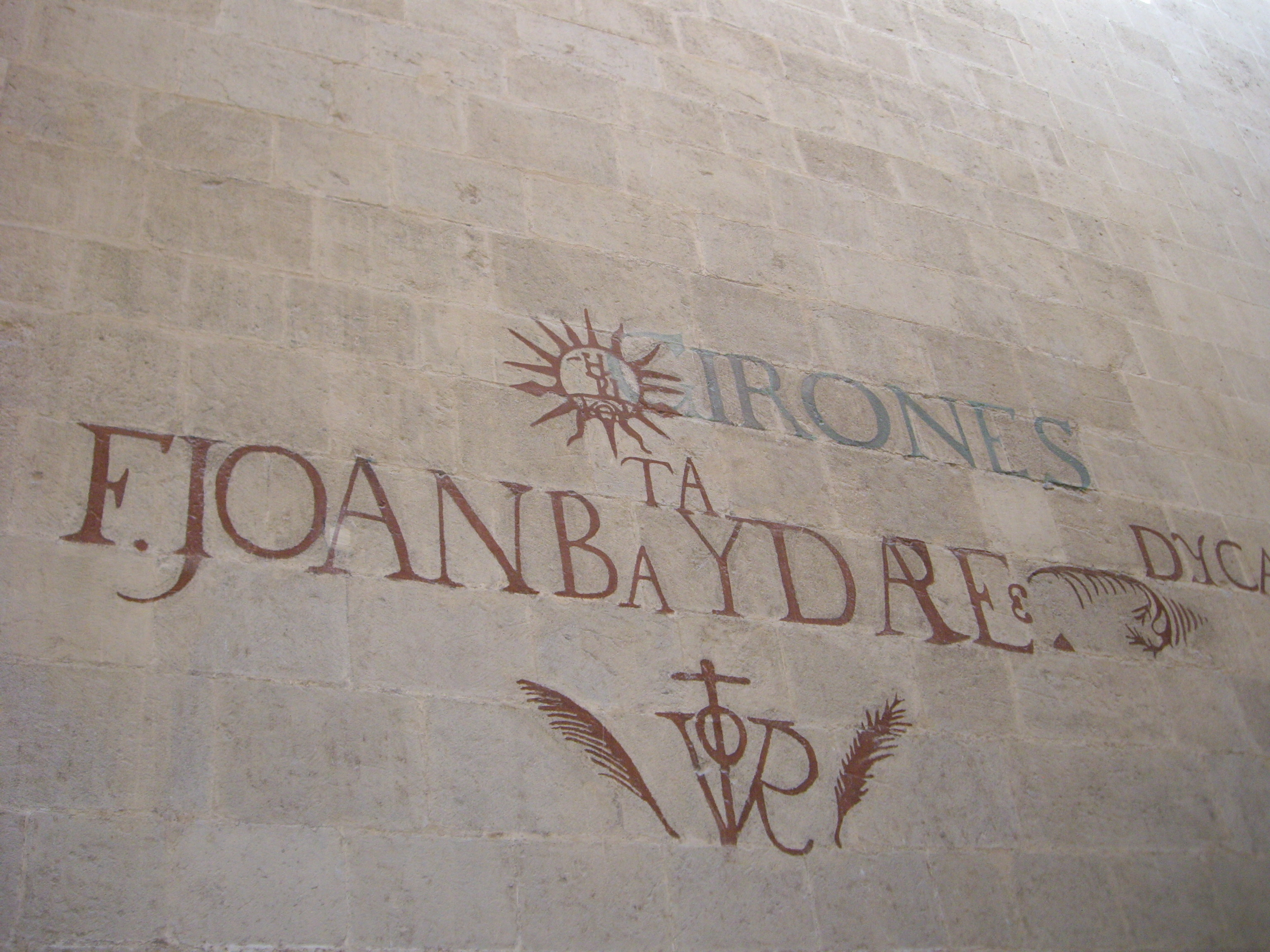 Gironés - Joan